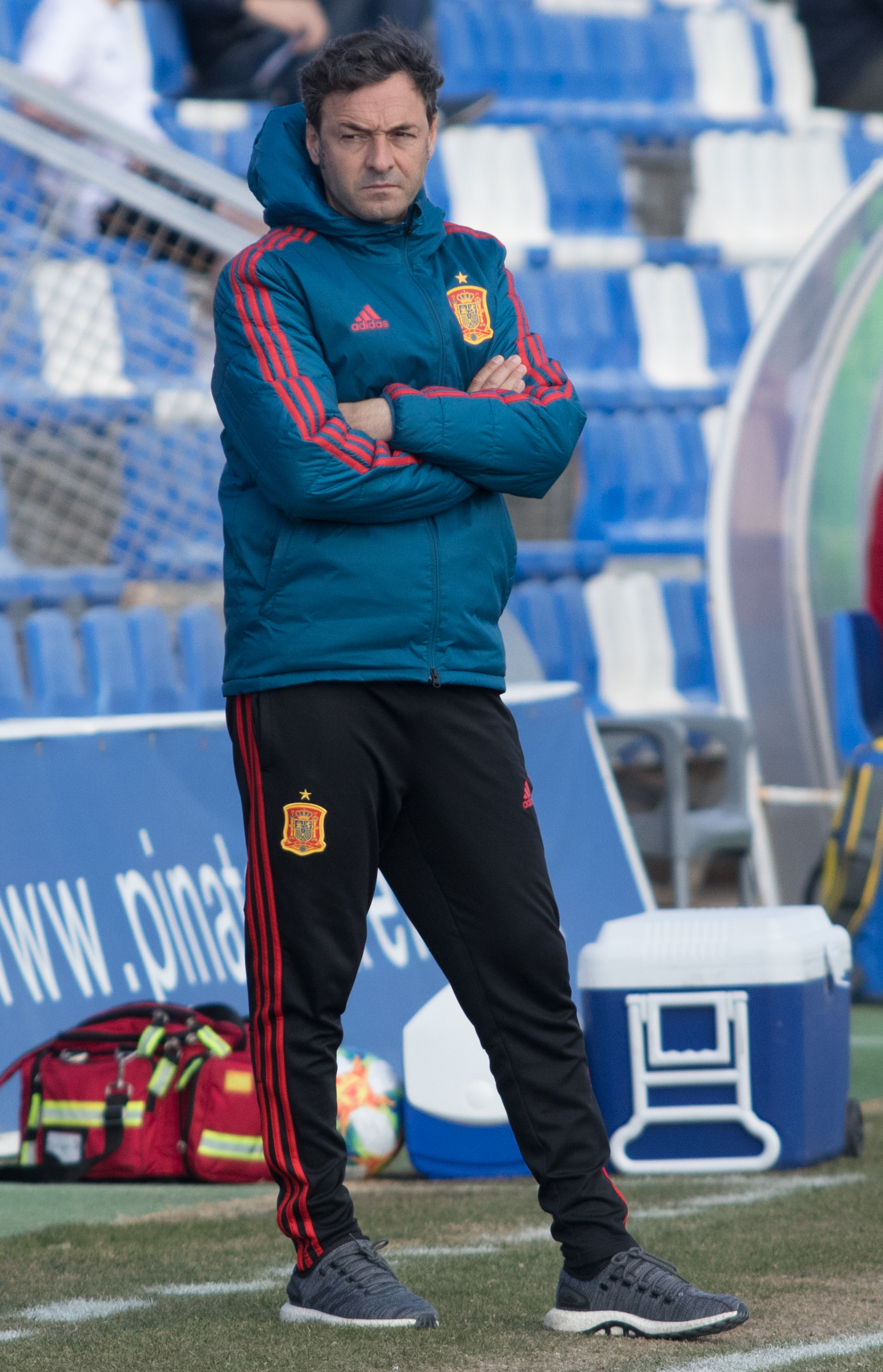 espana-escocia-sub19-23